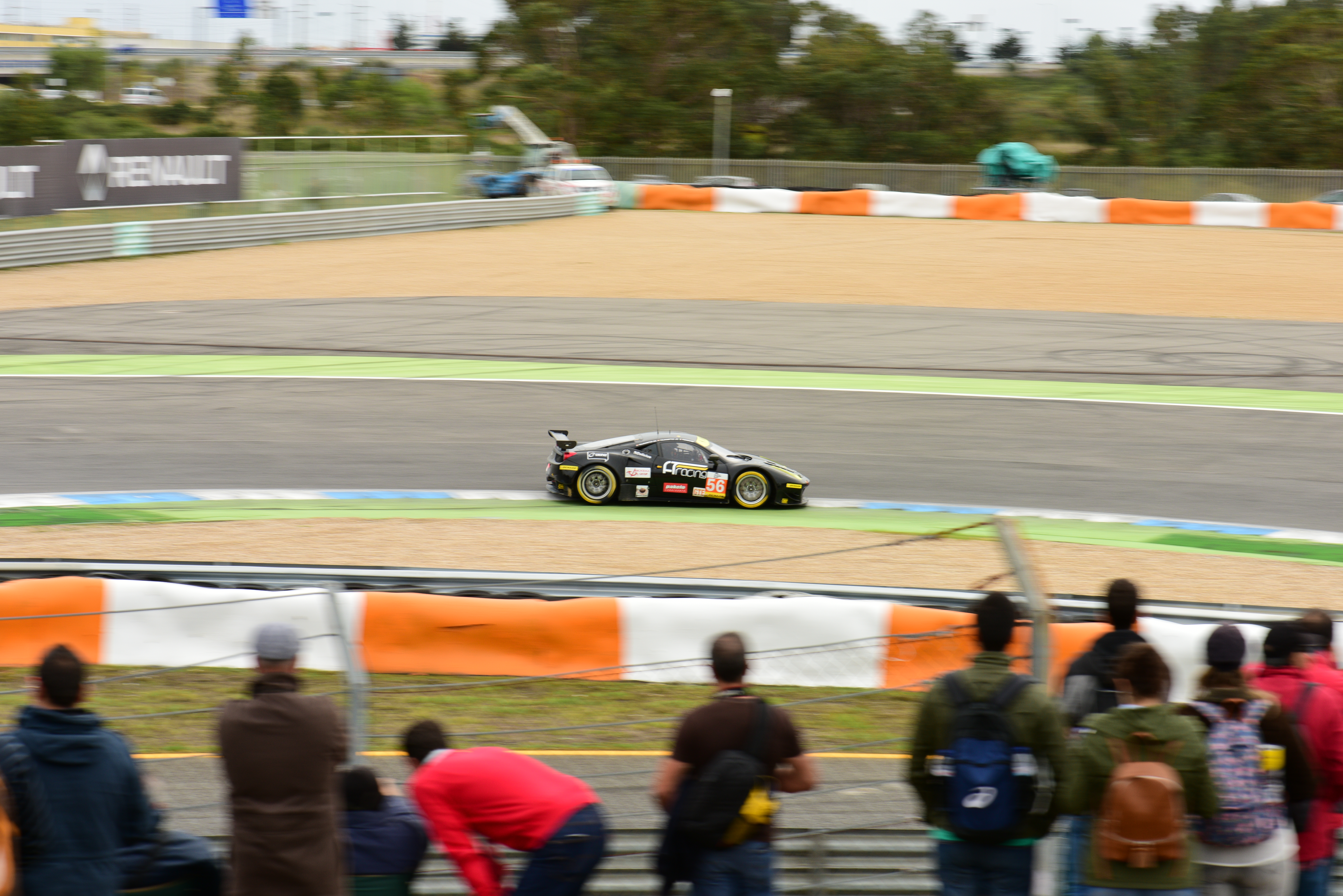 ELMS - 4 Horas Estoril